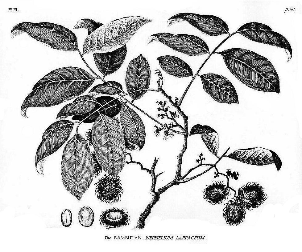 Rambutan